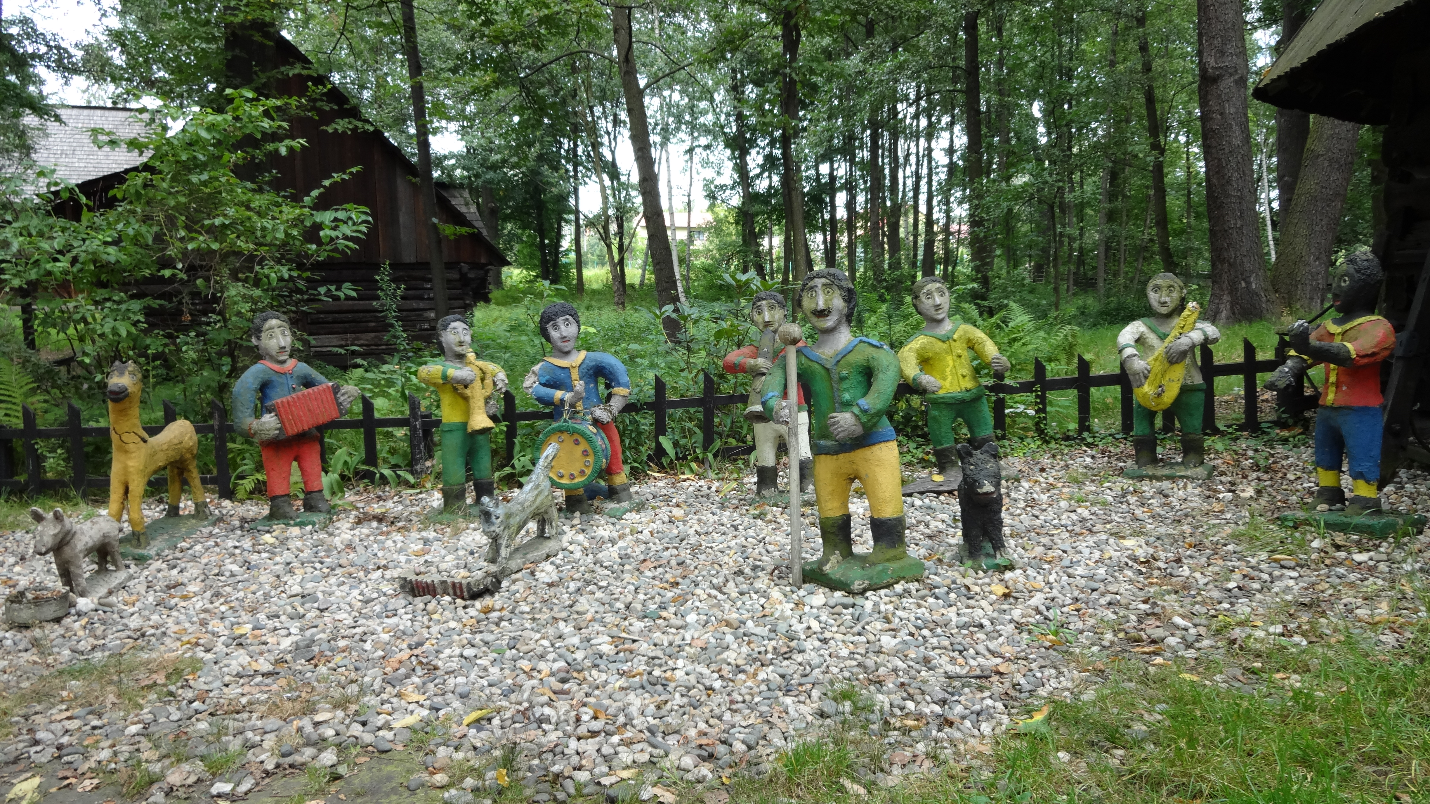 Pszczyna - Zagroda Wsi Pszczyńskiej (zabytek nr A/1219/76)